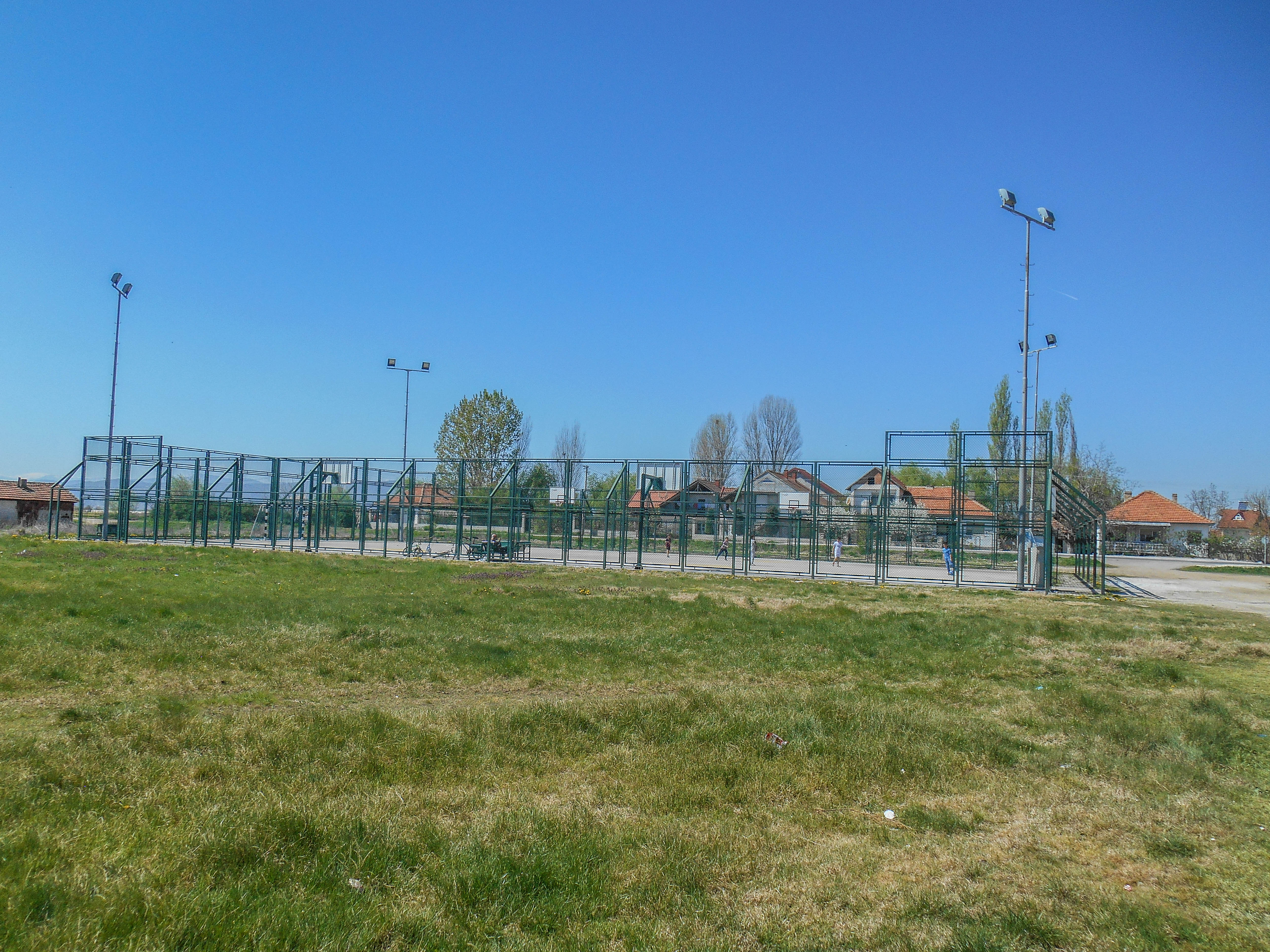 Спортско игралиште „Петар Чаулев“ - Петралинци